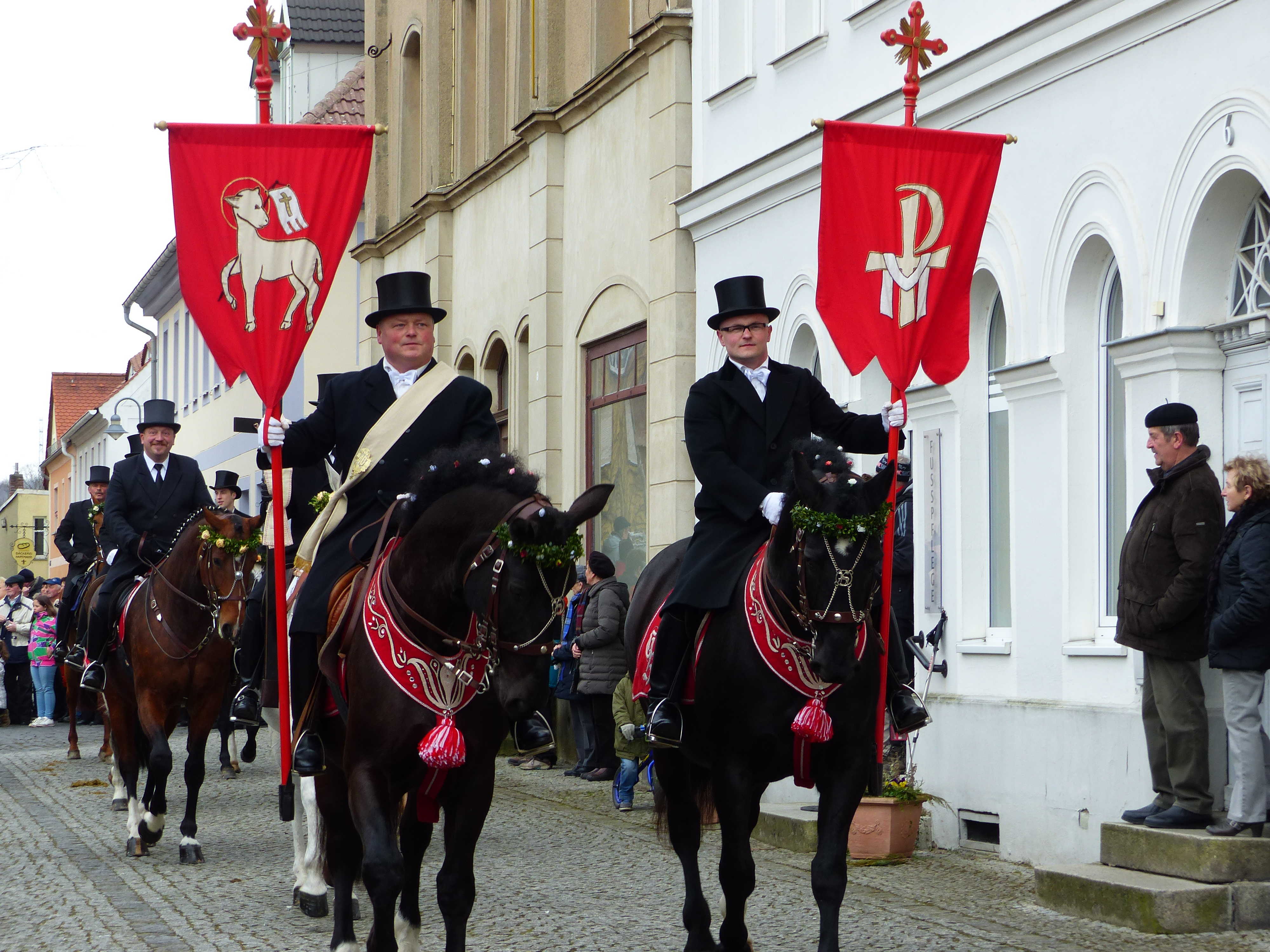 Ostersaatreiter in Ostritz am Ostersonntag, Sachsen